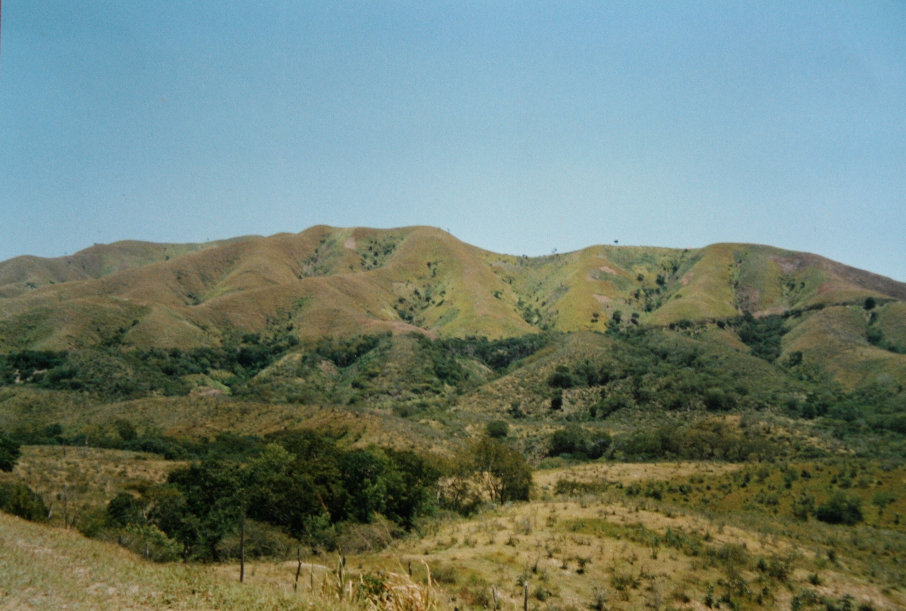 Grenzverlauf Dominikanischen Republik (unten) - Haiti (oben), 1986 (Banica, Provincia Elías Piña)